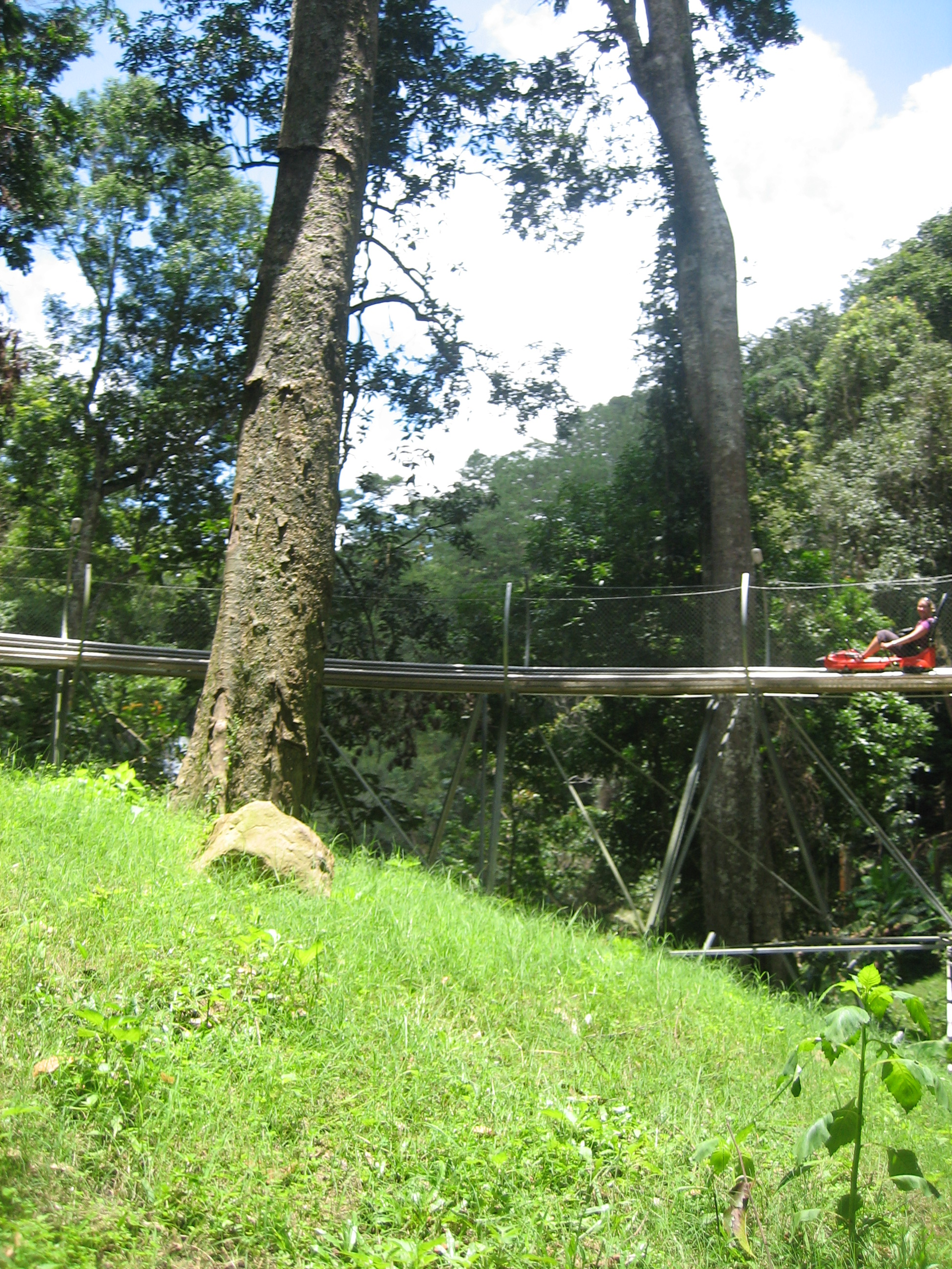 Alpine Sled, Datanla Waterfall.